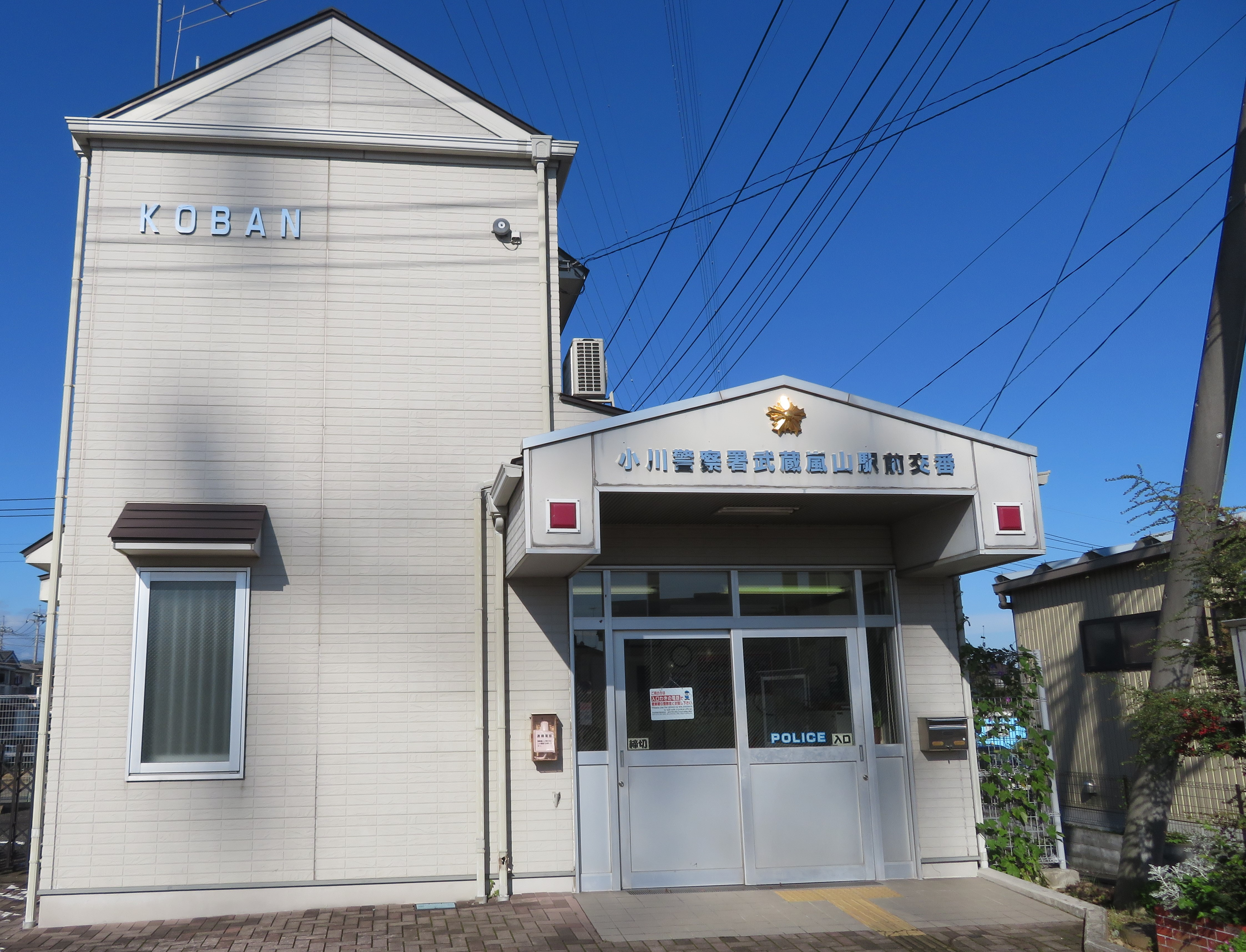 埼玉県比企郡嵐山町に所在する小川警察署武蔵嵐山駅前交番 Canon PowerShot SX720 HS